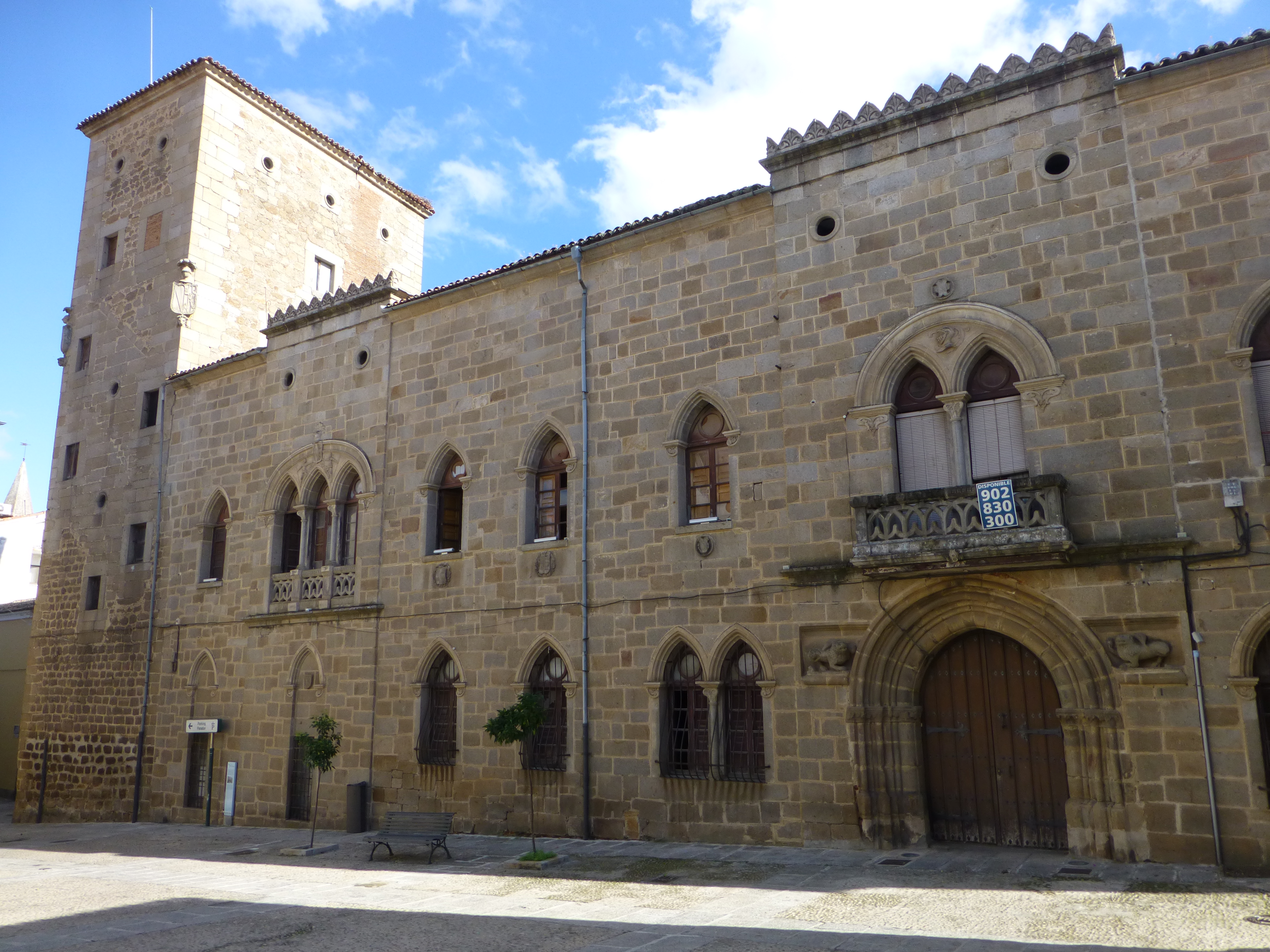 Casa de las Dos Torres. Plasencia. Extremadura. España.